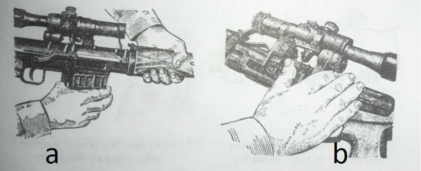 Handhabung des SWD-Scharfschützengewehres.